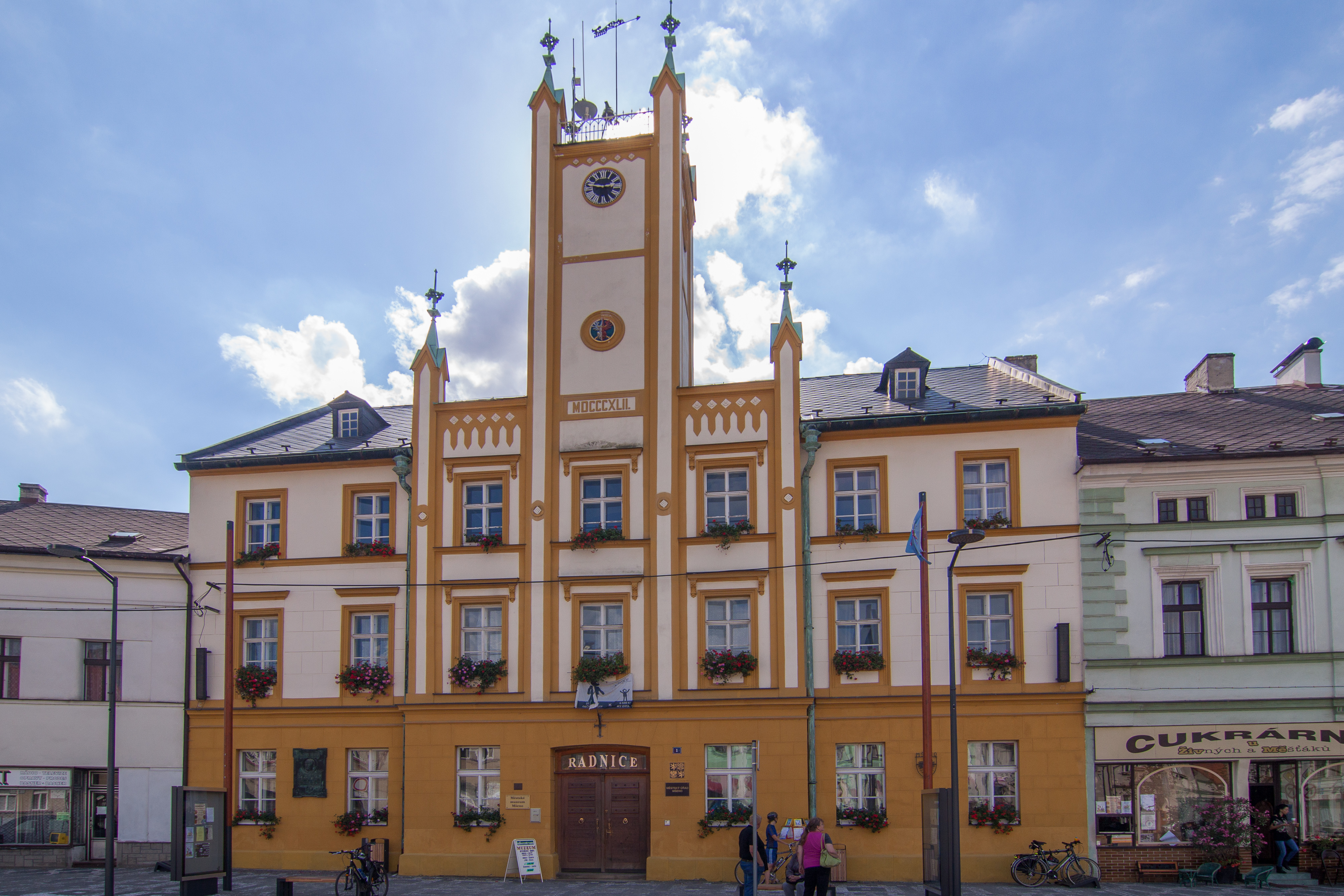 Radnice (Mšeno), nám. Míru 1, Mšeno